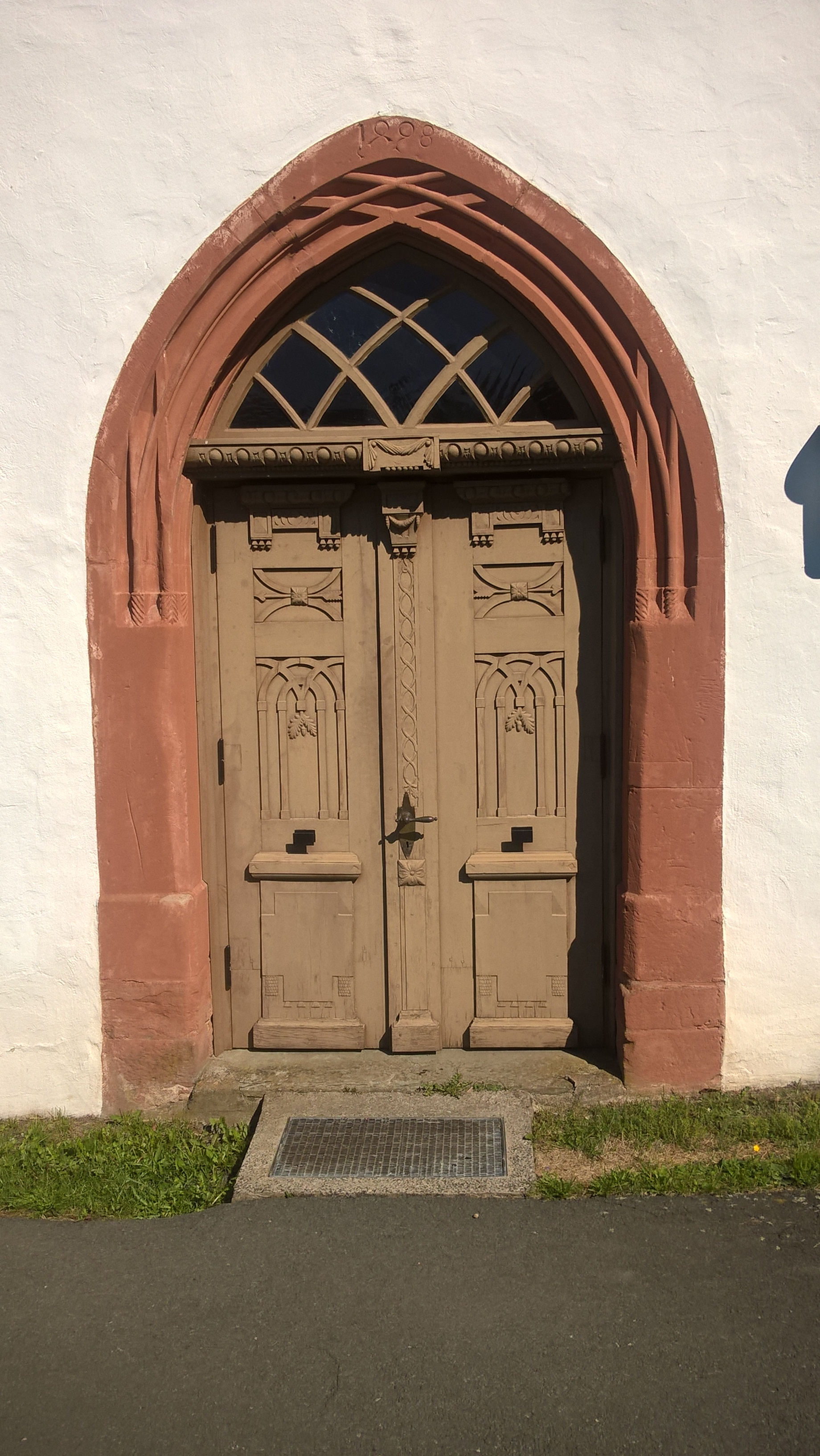 Evangelische Kirche Niederweidbach, Gemeinde Bischoffen, Landkreis Marburg-Biedenkopf, Hessen, Deutschland